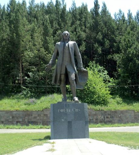 ԻՍՐԱՅԵԼ ՕՐԻ Քանդակագործ` Գագիկ Ստեփանյան, ՀՀ Վայոց ձորի մարզ, ք. Ջերմուկ 2/6